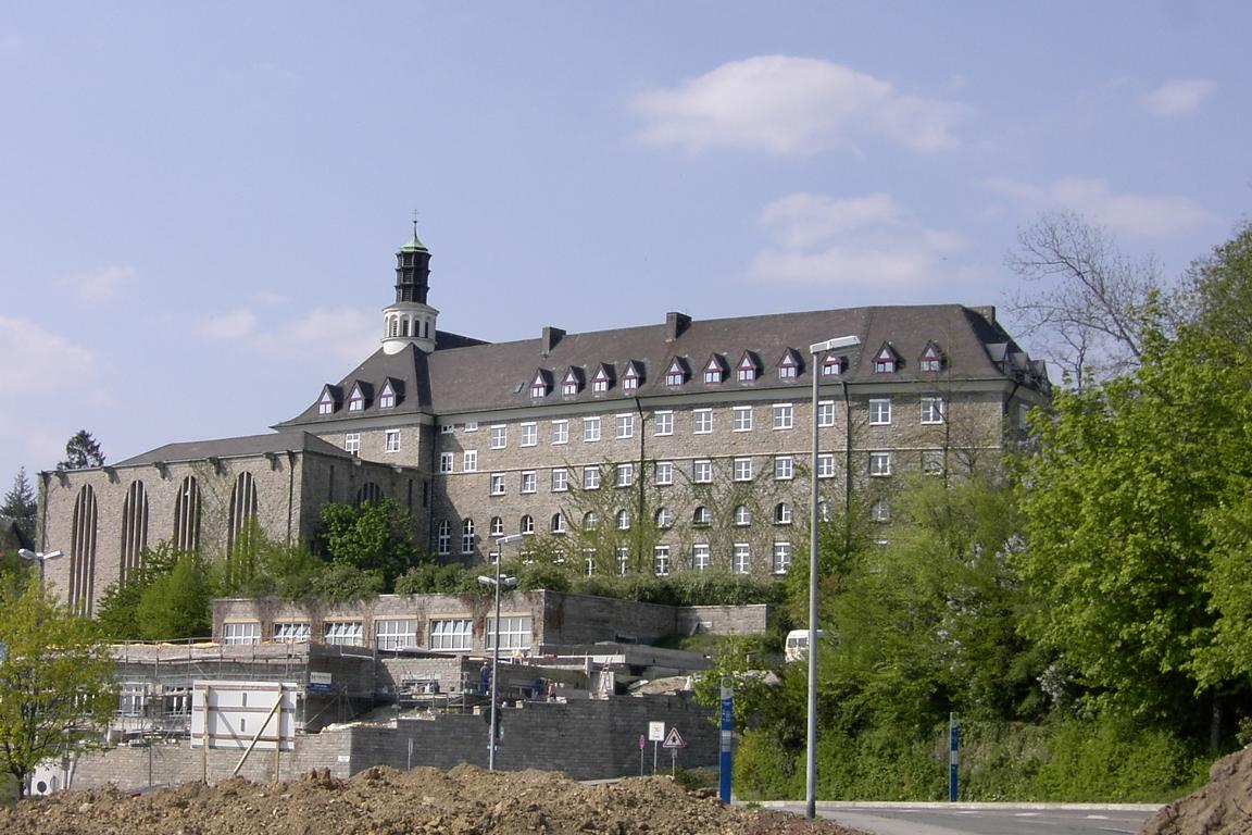 St. Paulusheim, Bruchsal, von Südosten